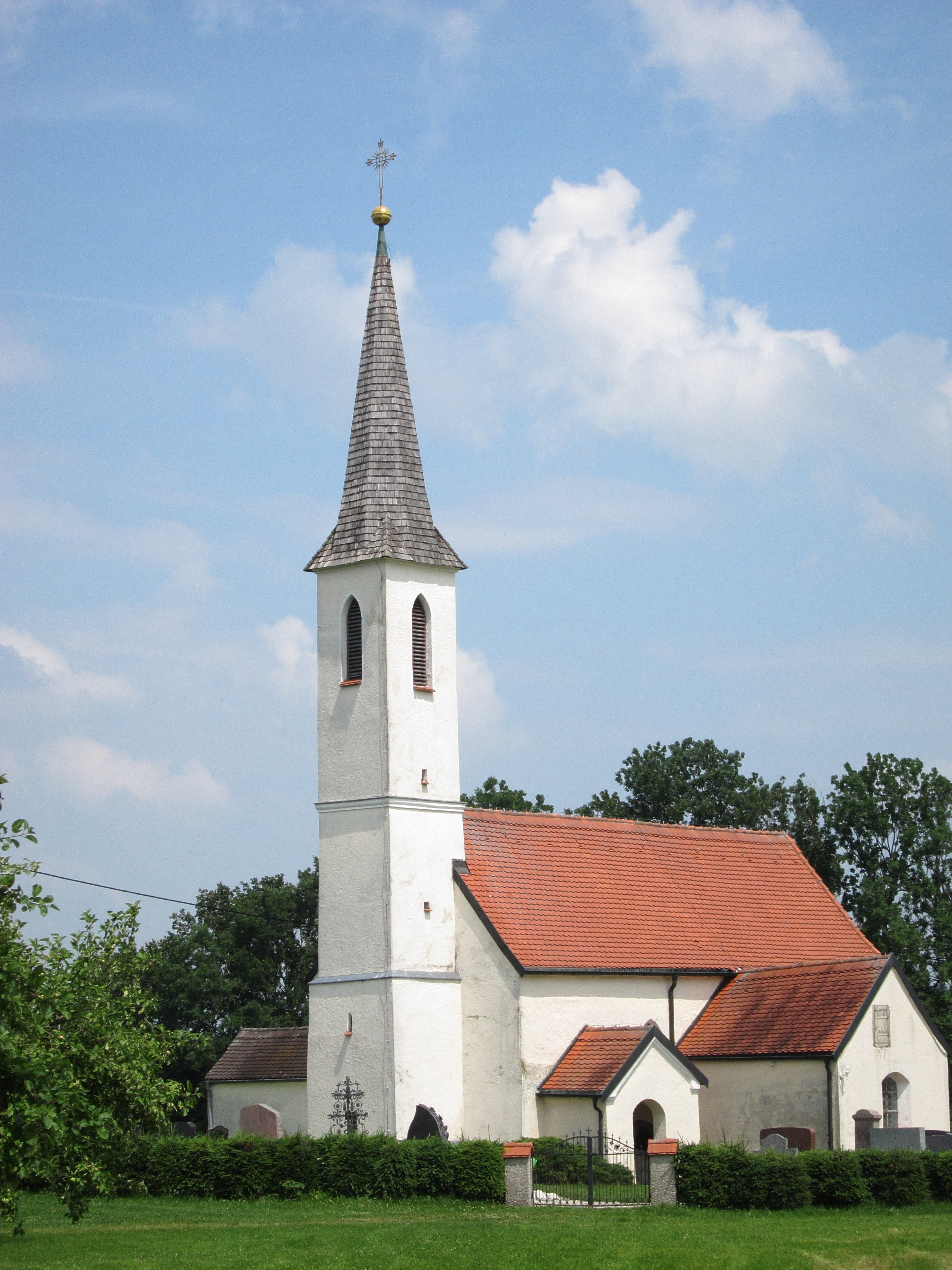 Pyramoos; katholische Filialkirche St. Agatha, kleiner Saalbau mit polygonalem Chorschluss und angefügter Sakristei, zweite Hälfte 15. Jahrhundert mit romanischem Kern und neugotischem Westturm.